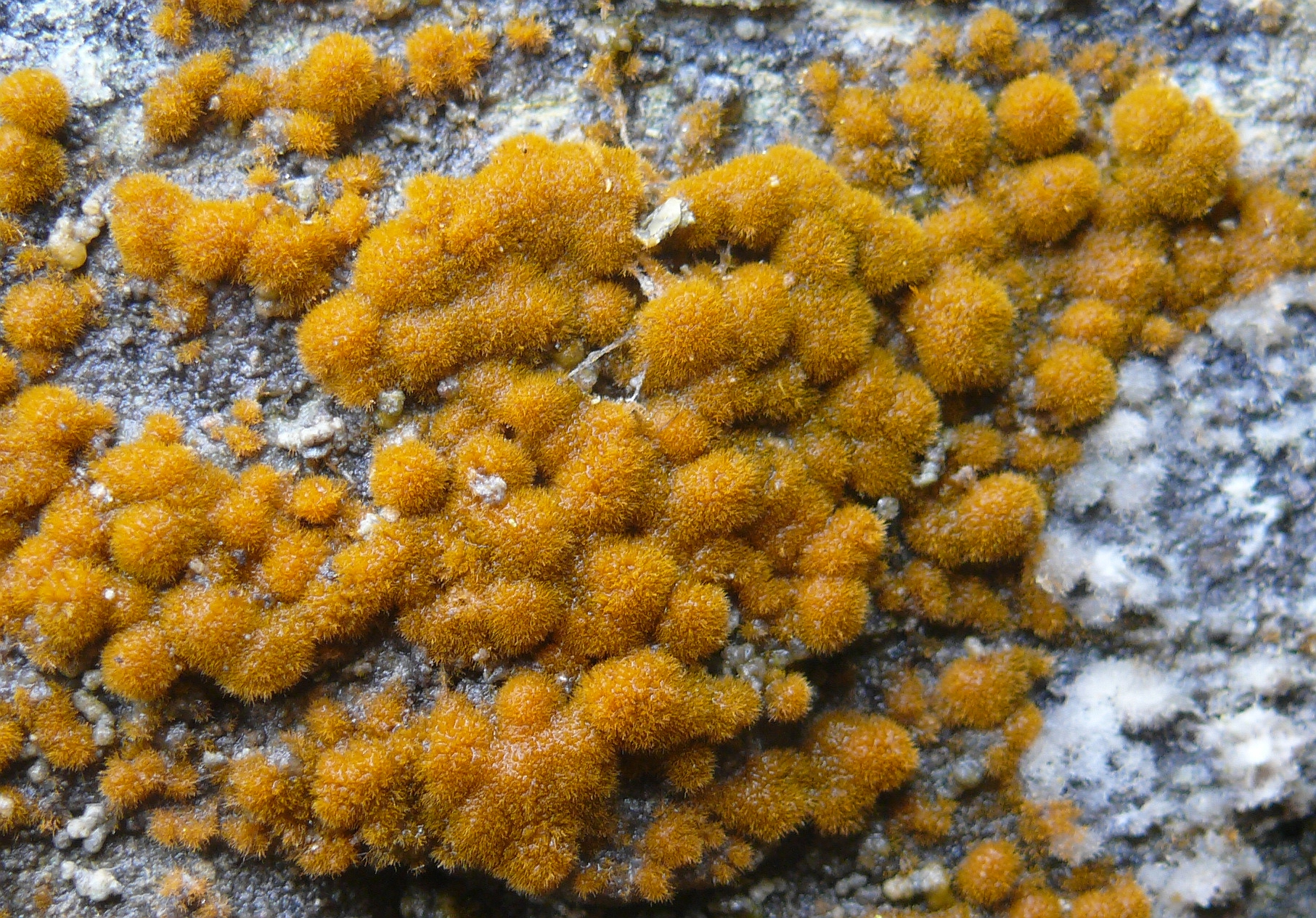 Trentepohlia aurea, Tauberland, Deutschland